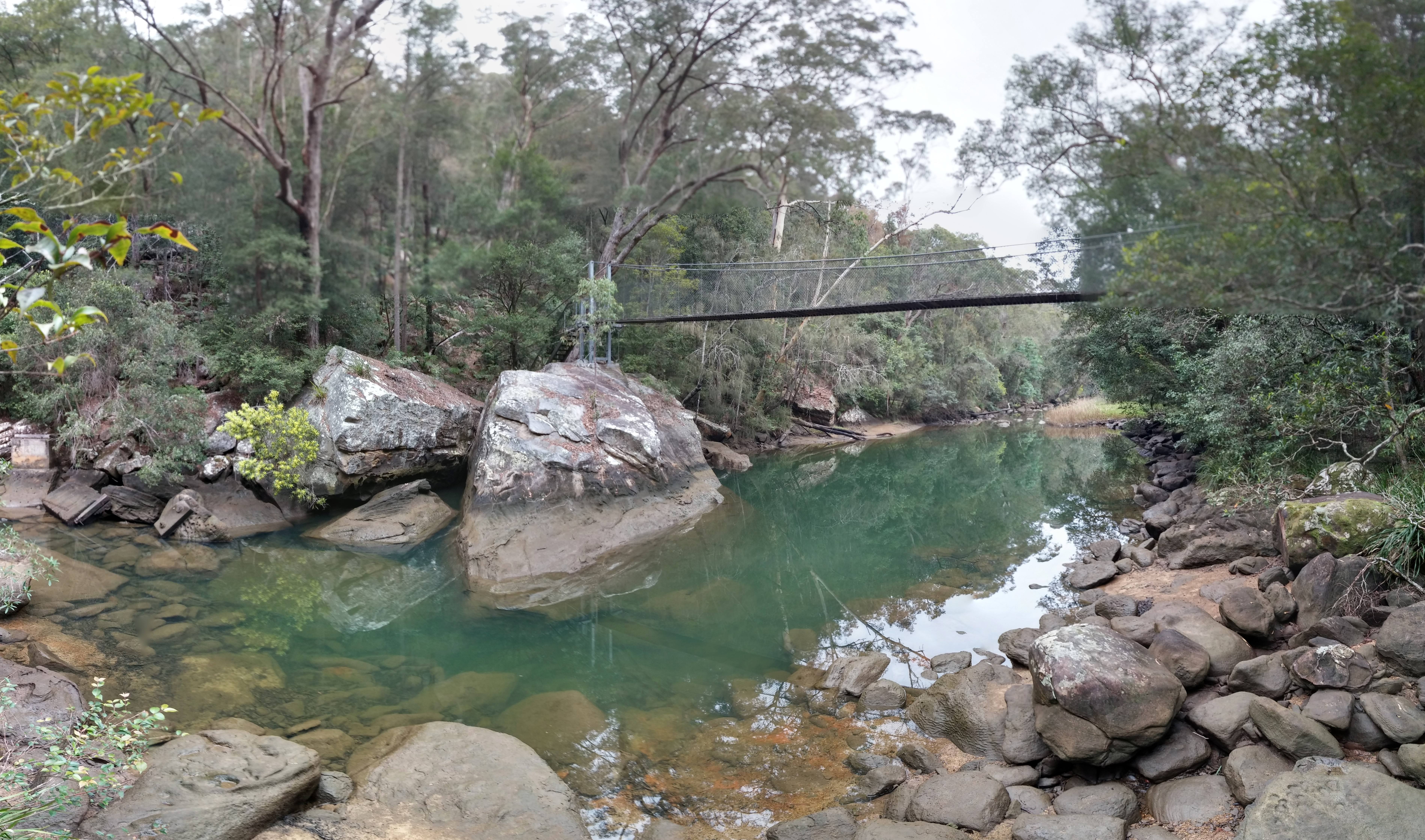 Kariong NSW 2250, Australia